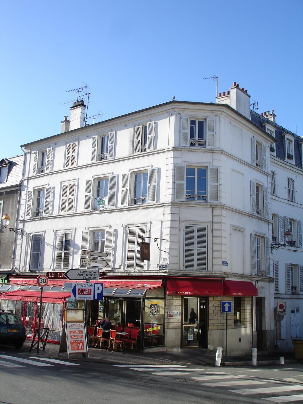 L'auberge du Cheval-Blanc - Montmorency (France)